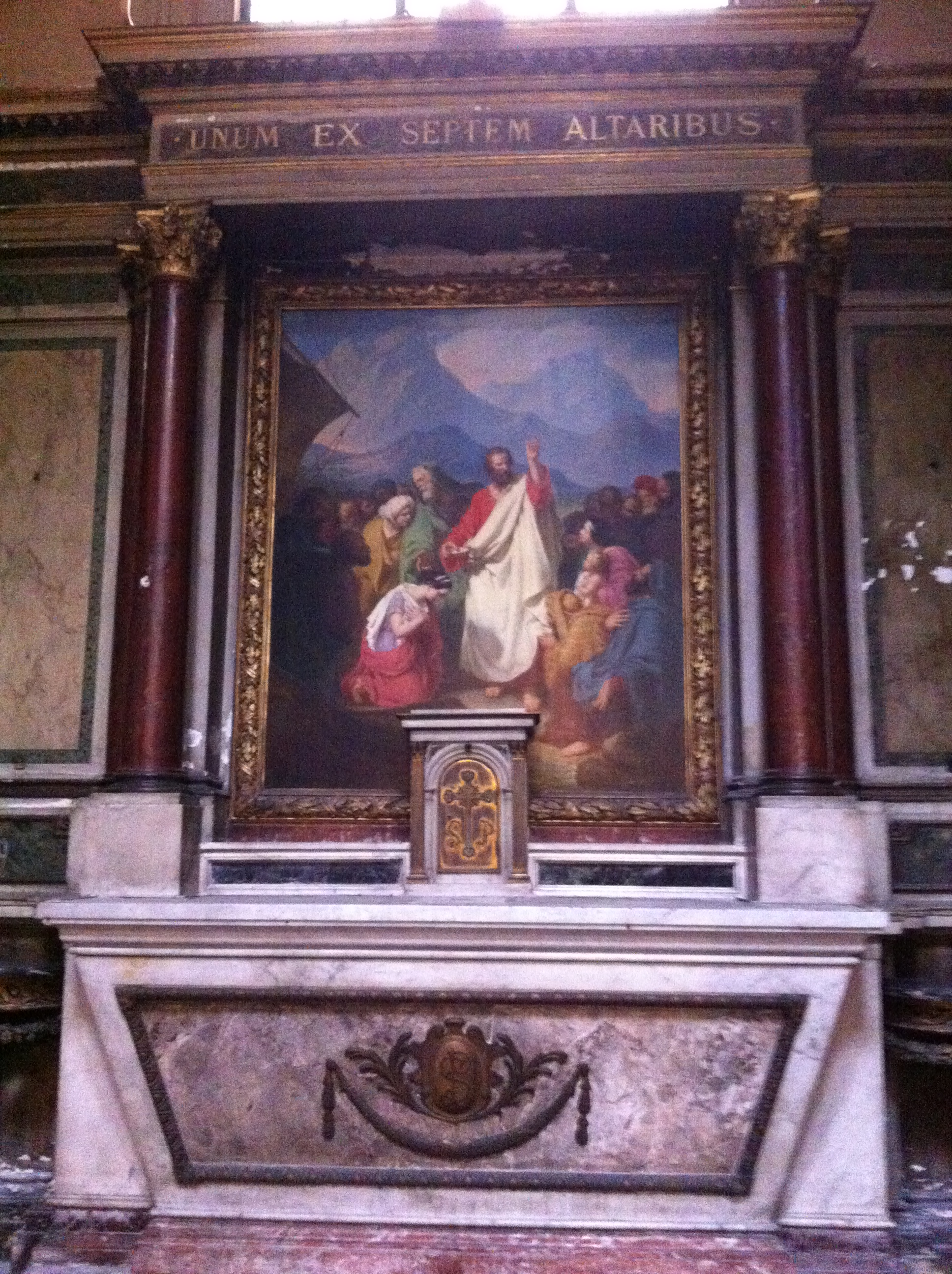 Interior of Église Saint-Paul-Saint-Louis, Paris, France